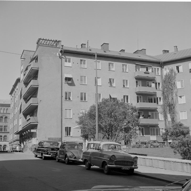 Gumshornsgatan 3-7 i kvarteret Harpan.